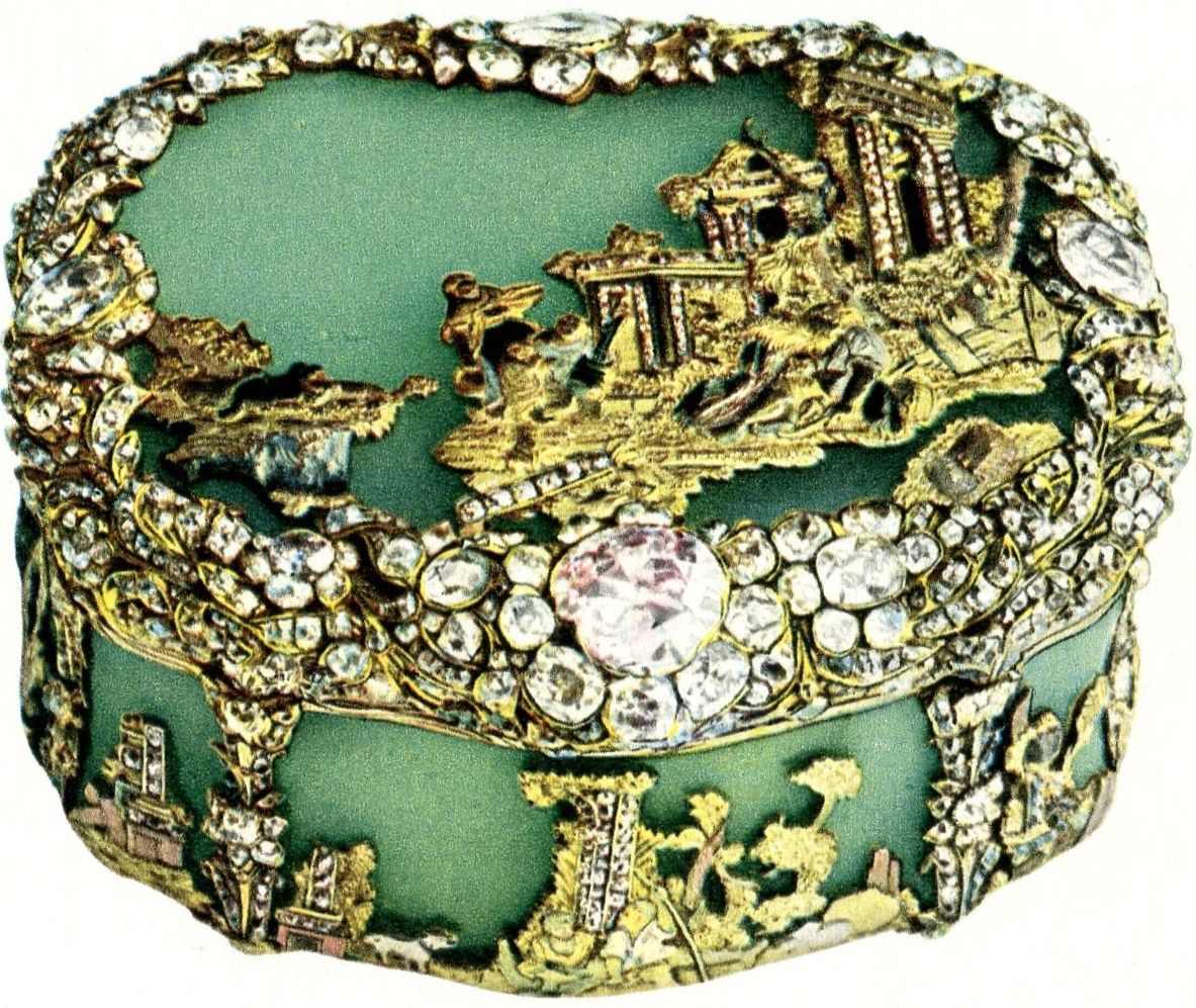 Prunk-Tabatiere aus der Sammlung Friedrich des Großen aus Chrysopas